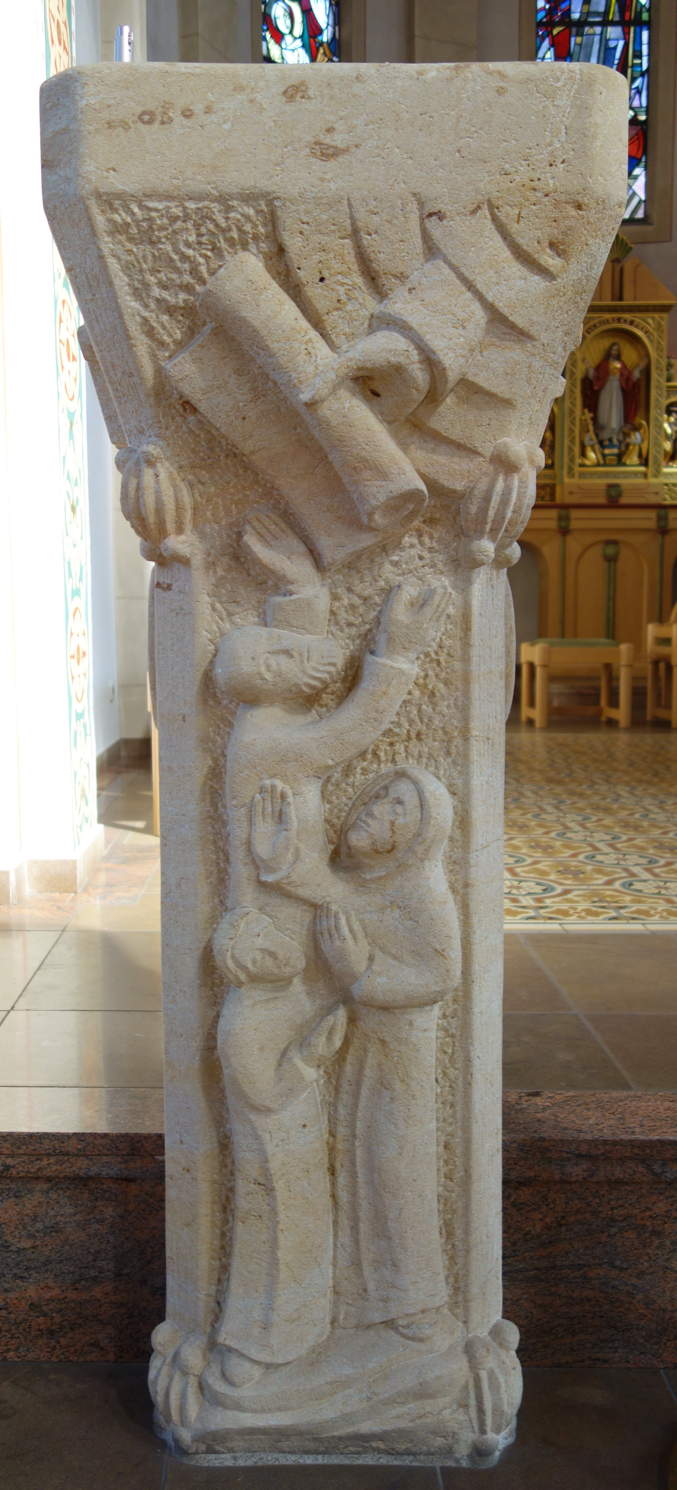 Pfarrkirche St. Maria-St. Vicelin, Neumünster, Ambo